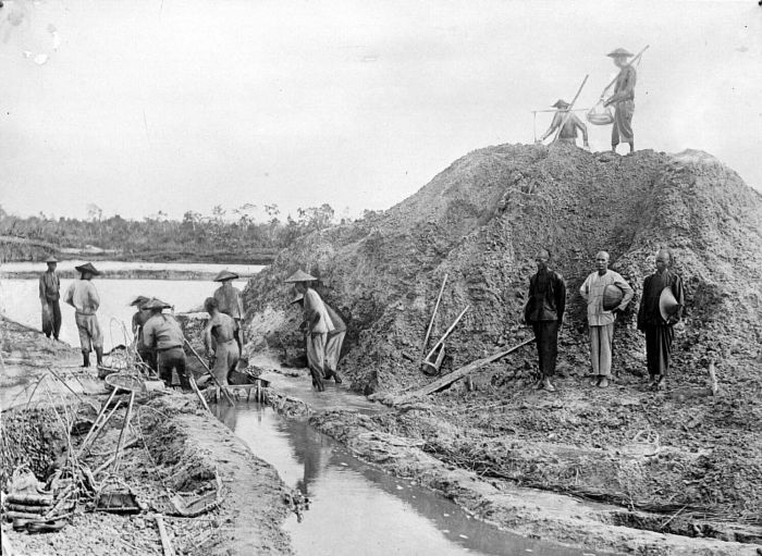 Repronegatief. Arbeiders wassen het erts, Manggar